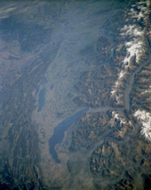 Zwitserland - satellietopname van NASA Oorspronkelijke afbeelding op - vrij bruikbaar met bronvermelding